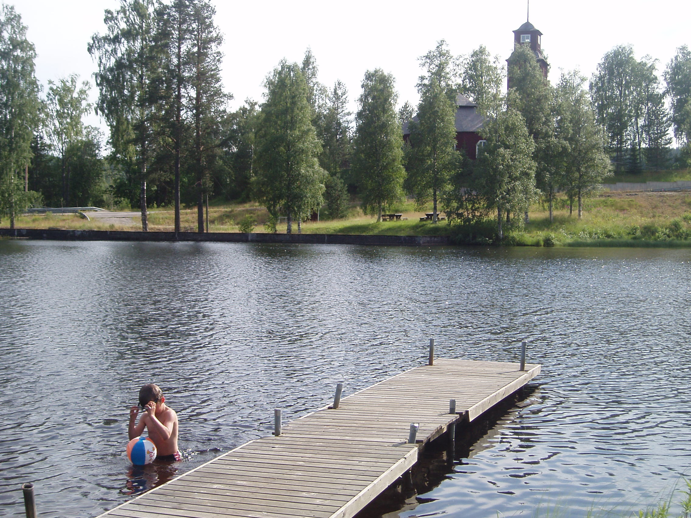 Lagfors badplats i Ljustorp, Medelpad